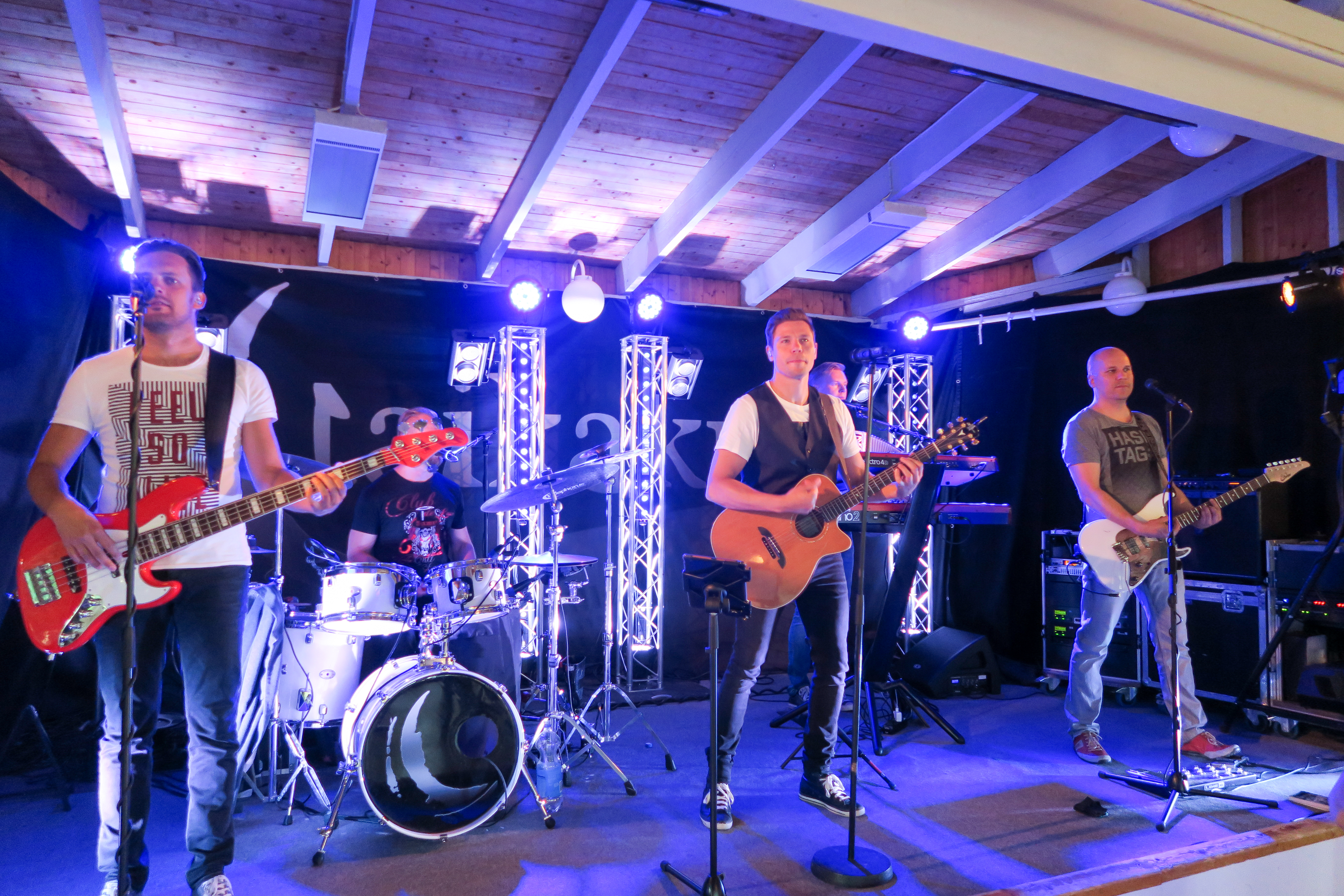 Taikakuu suomalainen tanssiorkesteri